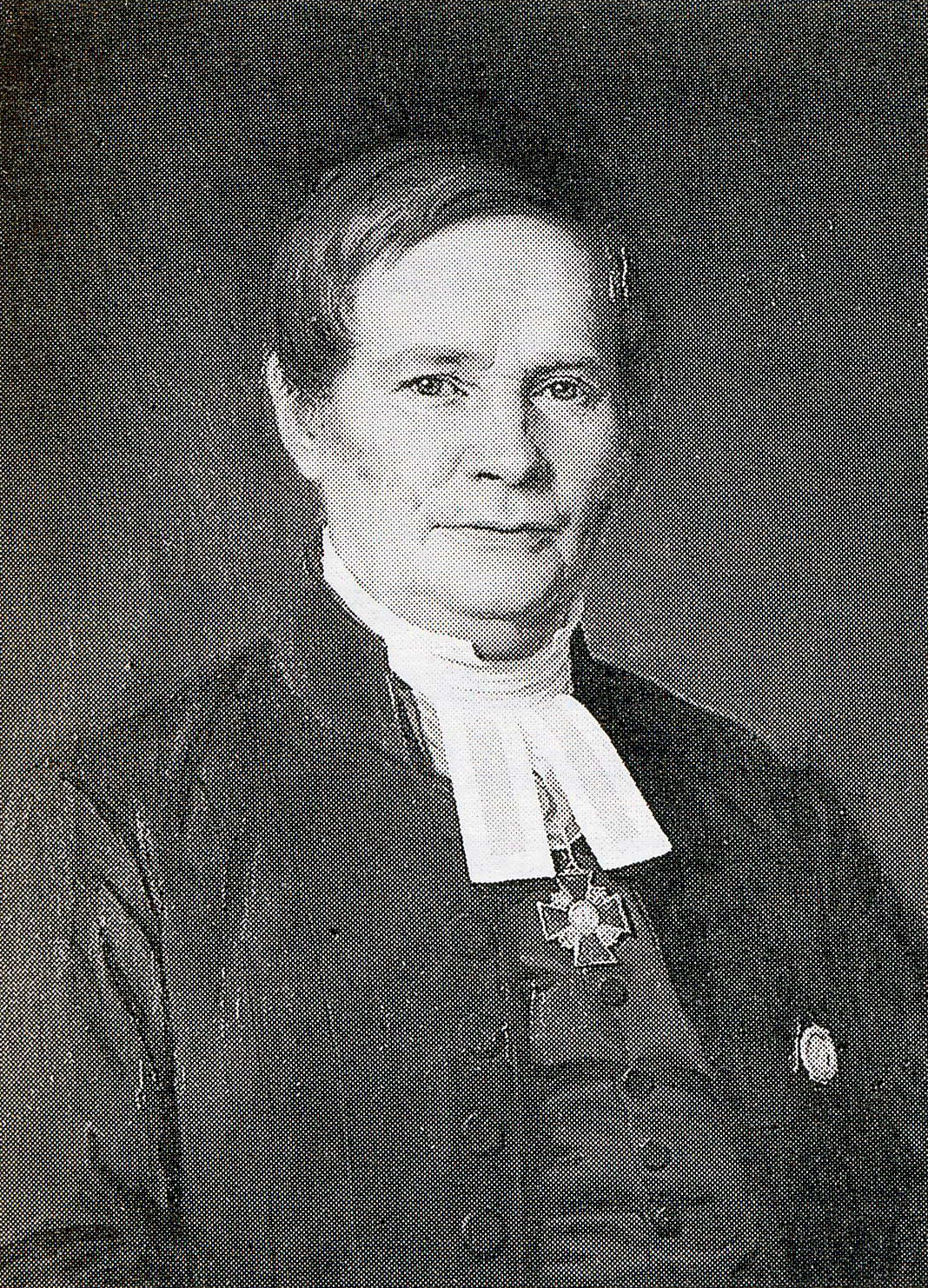 Venäjän kielen professori Matthias Akiander (1802–1871).